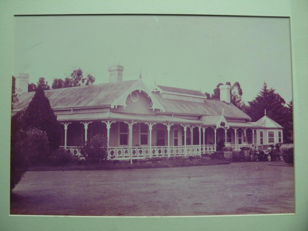 Middelburg Distrikshospitaal - Kobus Terblanche